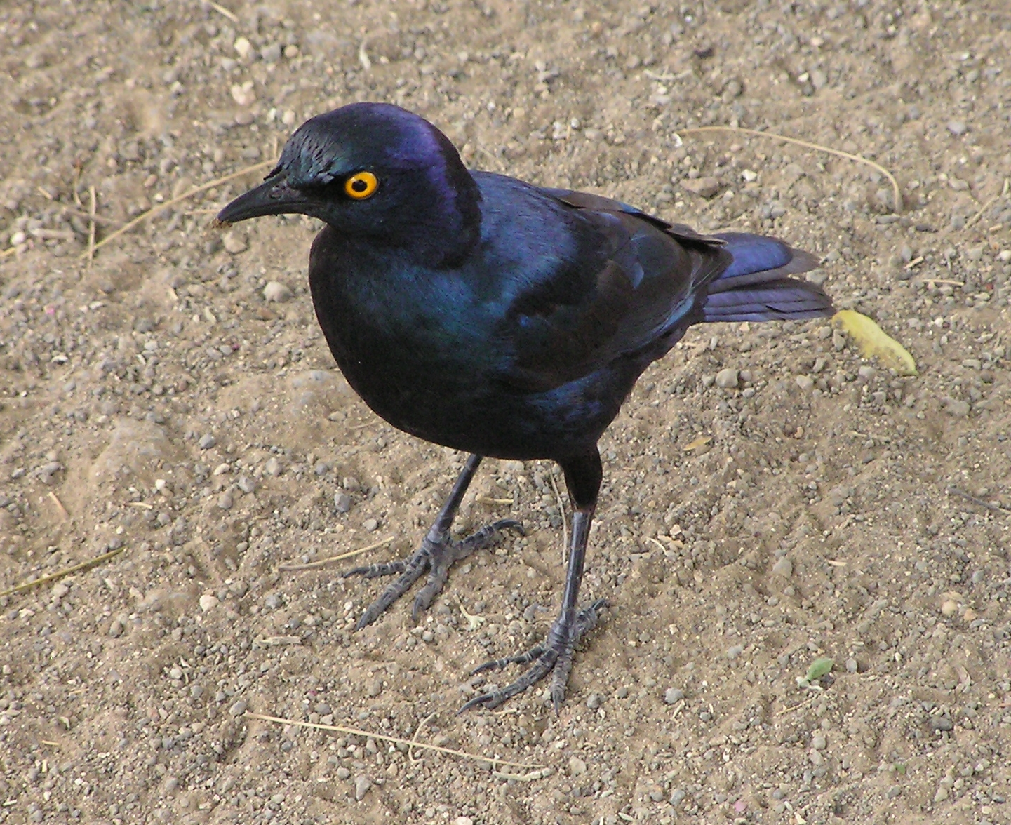 Glanzstar (Lamprotornis nitens) im Kruger Park, Südafrika.